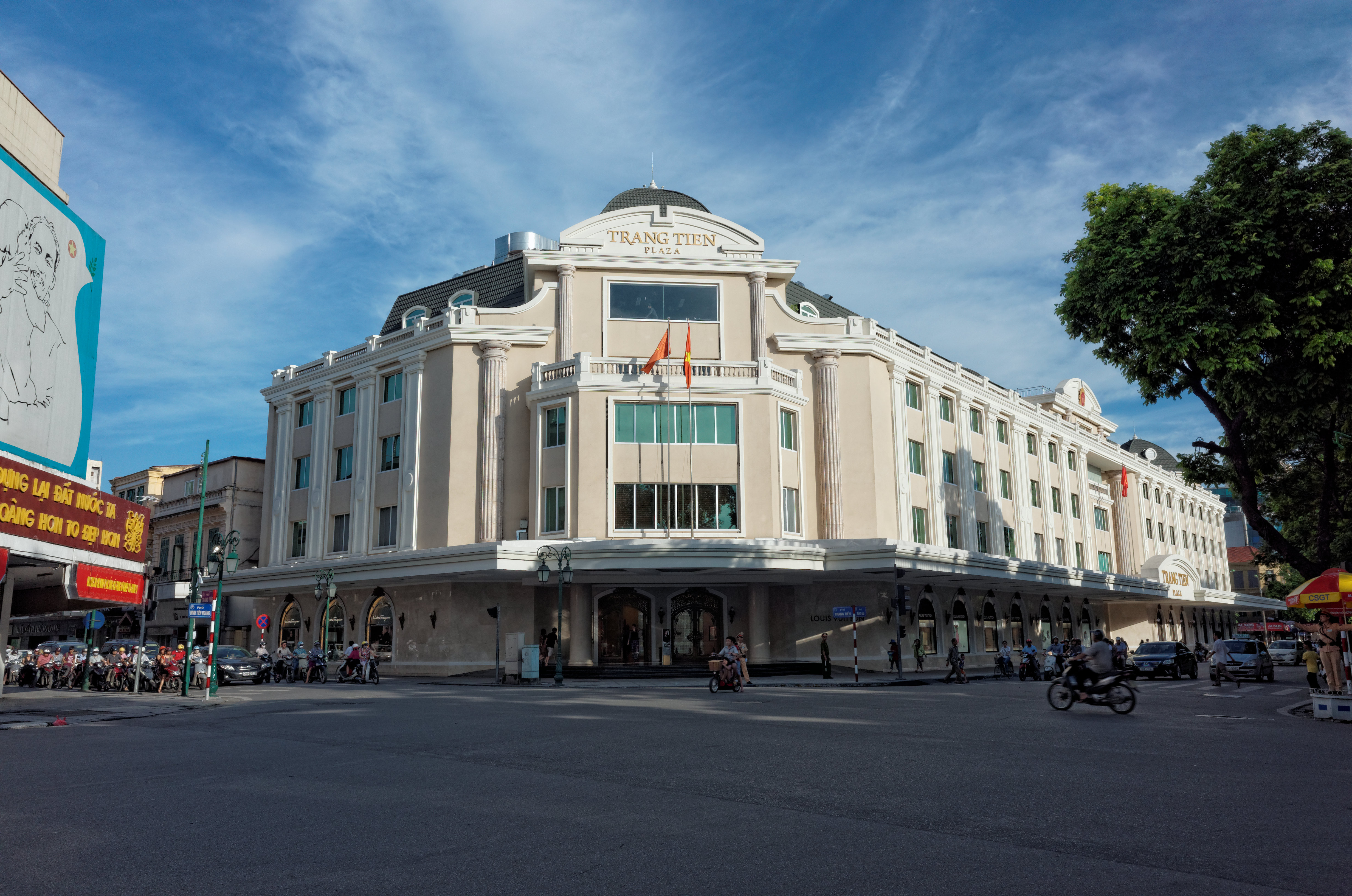 Trang Tien Plaza building, Hanoi.